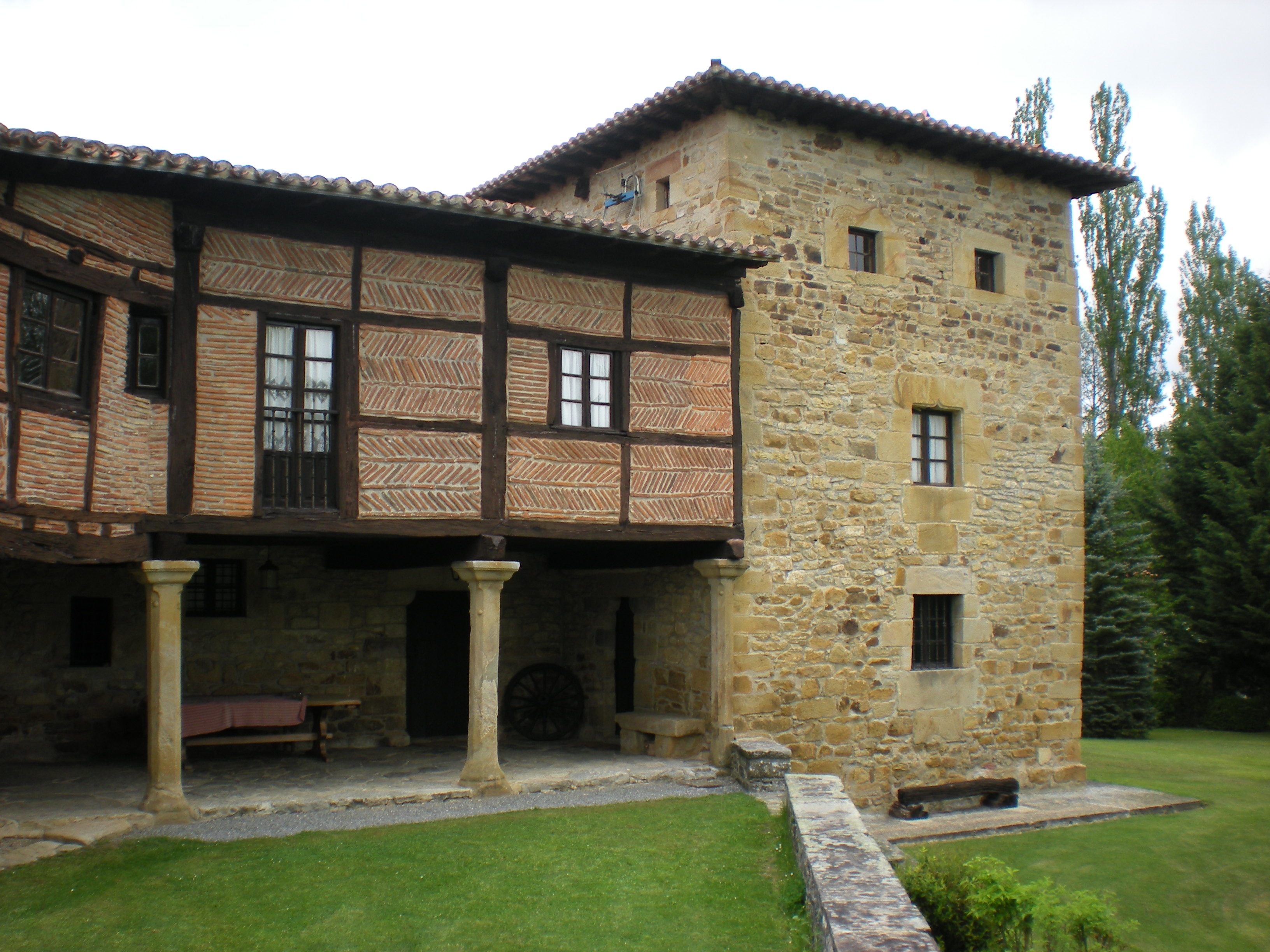 Lazarraga dorrearen aurrealdearen eskuinaldea. Larrea herrian dago (Barrundia, Araba).